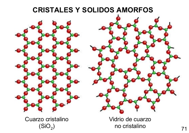 Solido kristalino eta amorfoaren egitura